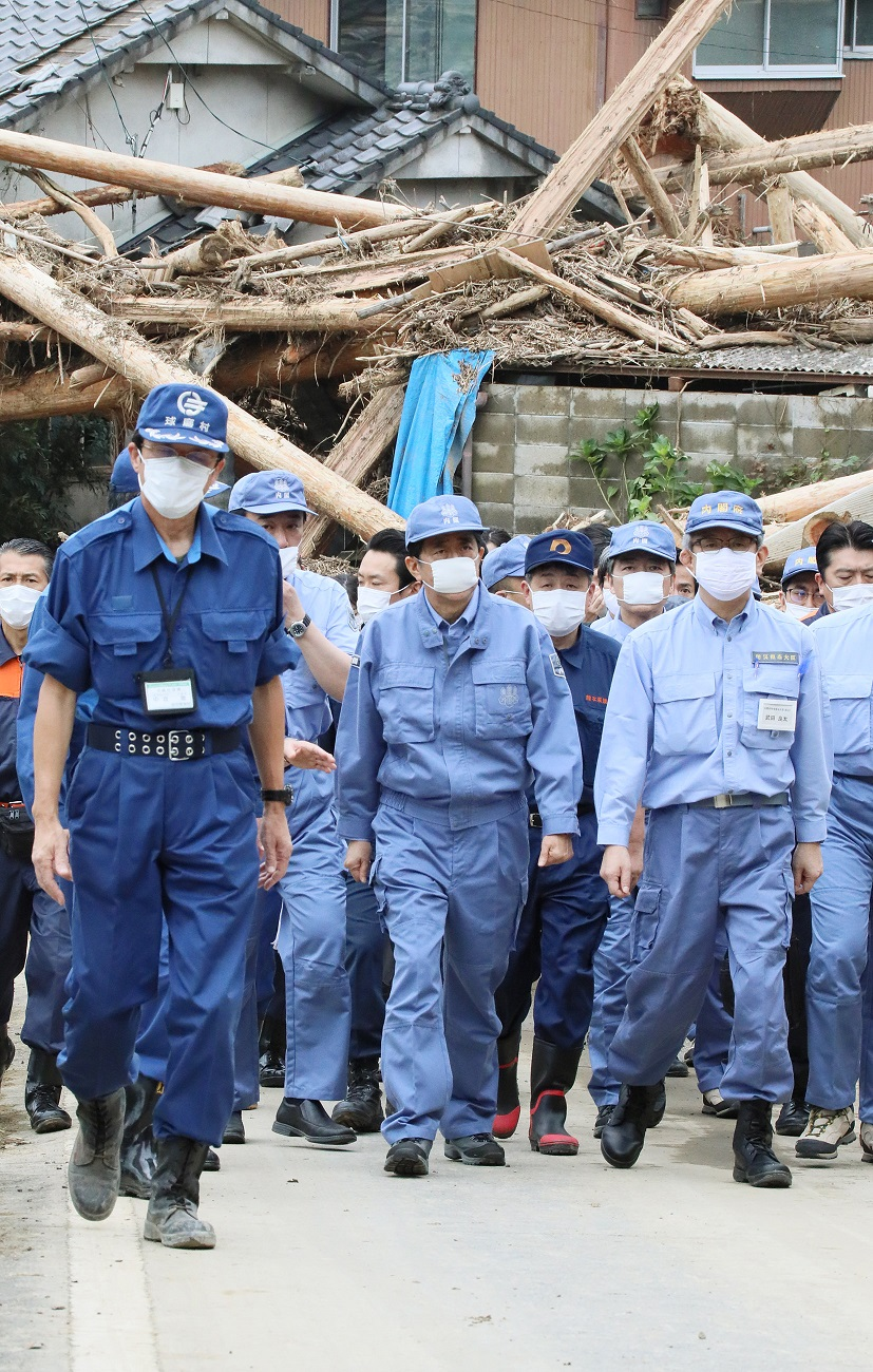 令和２年７月豪雨による被害状況視察のための熊本県訪問